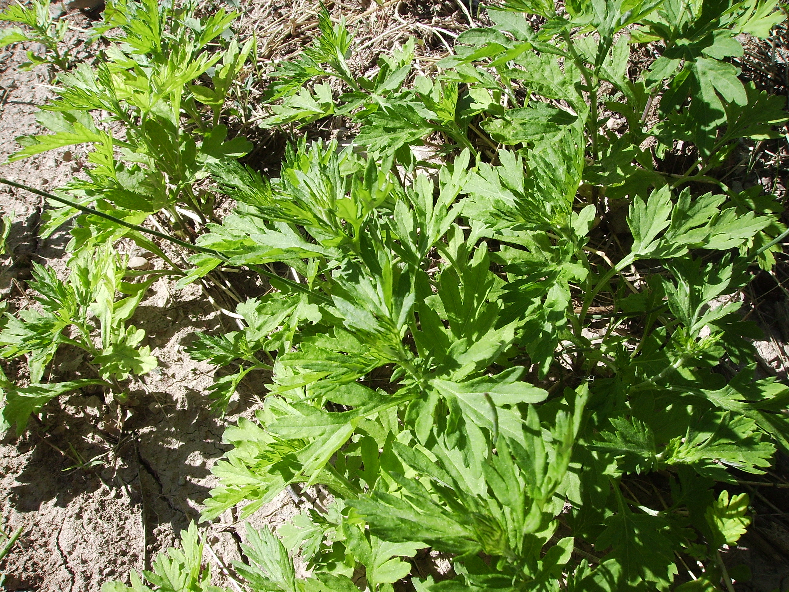 Image:Artemisia_s..jpg Artemisia sp at Castelltallat, Catalonia